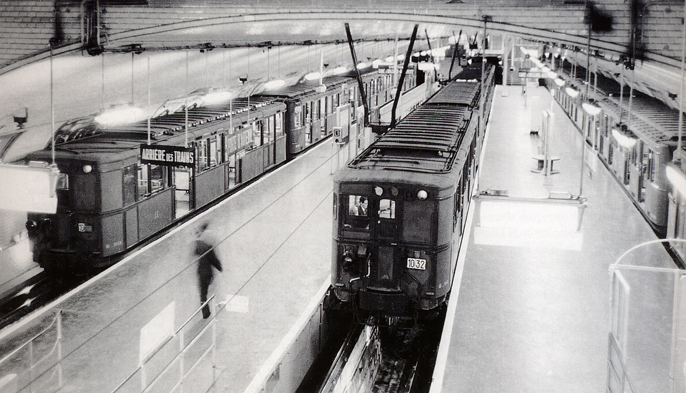 Ligne 10 du métro de Paris, France. Le terminus Porte d'Auteuil.